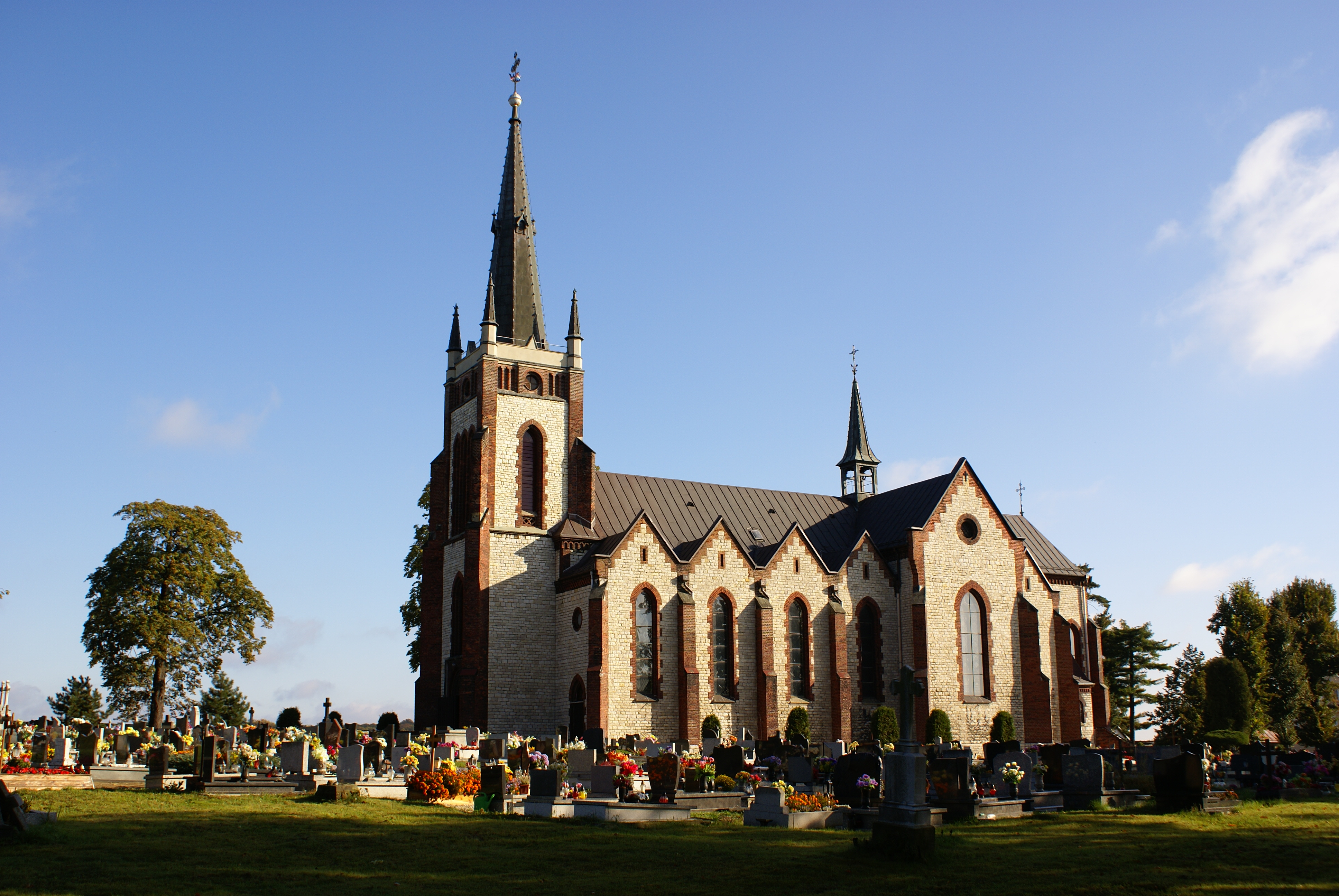 Tarnowskie Góry - kościół parafialny pw. św. Mikołaja wraz z otaczającym go cmentarzem (zabytek nr A/340/11)